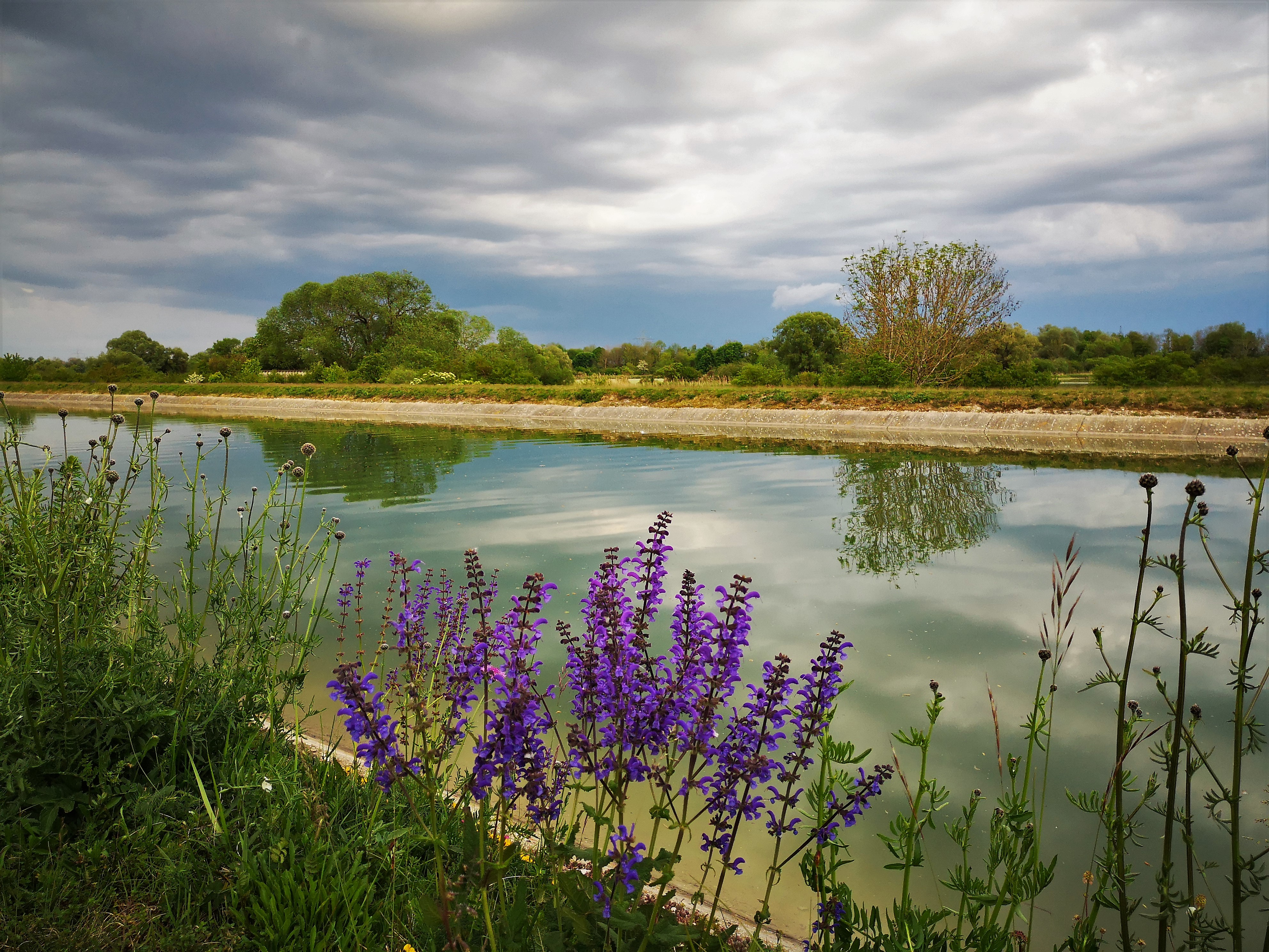 Wikipedia Vogelstimmen-Exkursion zum Speichersee